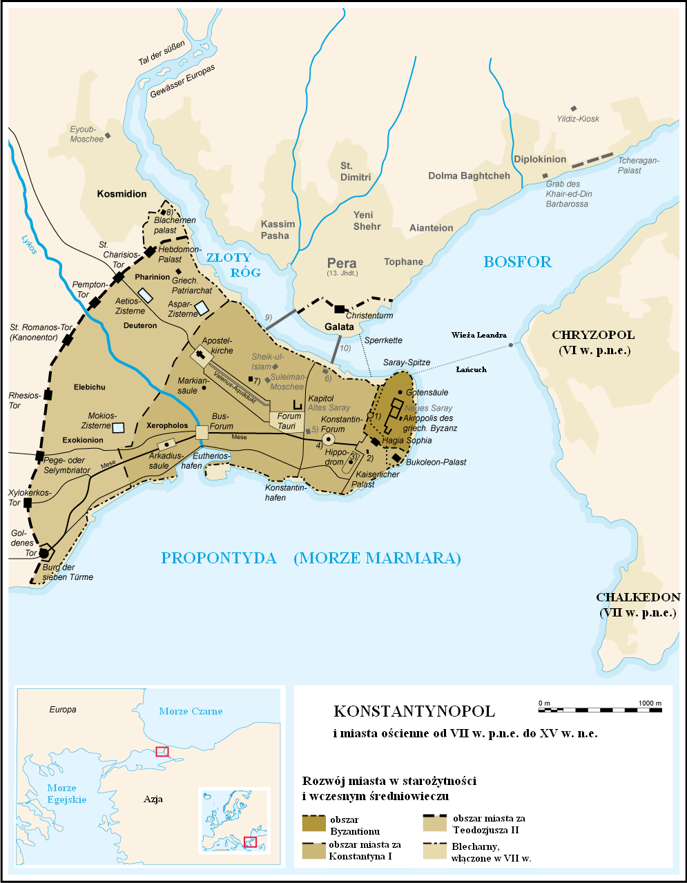 Mapa przedstawiająca położenie Konstantynopola oraz pobliskich miejscowości.